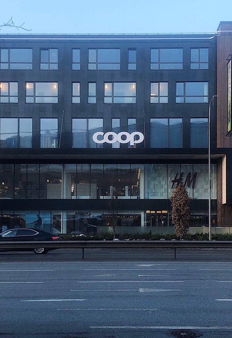 H&M ja Coop kauplused Tartus Kvartali keskuses 2020. aastal